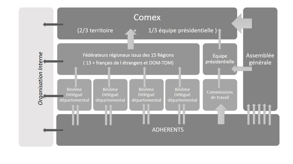 organisation de Génération Citoyens